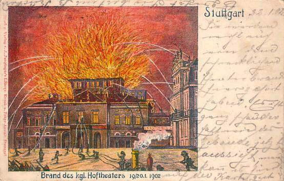 Front Text: "Stuttgart - Brand des kgl. Hoftheaters 19./20.1.1902" Handwritten Front Text: dated 22 Jan 1902 - "Sie müssen wohl auch von dem schrecklichen Theater-Brand hier gehört haben. Es ist ganz schauderhaft wie das Gebäude jetzt aussieht & man kann es hier auf der Karte gut erkennen. Es grüßt Sie bestens - B. Kücker" ["You certainly must have heard of the terrible theatre fire here. It is quite horrible how the building is looking like now, as you can easily recognize on this card. Best regards - B. Kücker"] Sent: from Stuttgart to Hannover, 23 Jan 1902 (three days after the fire)